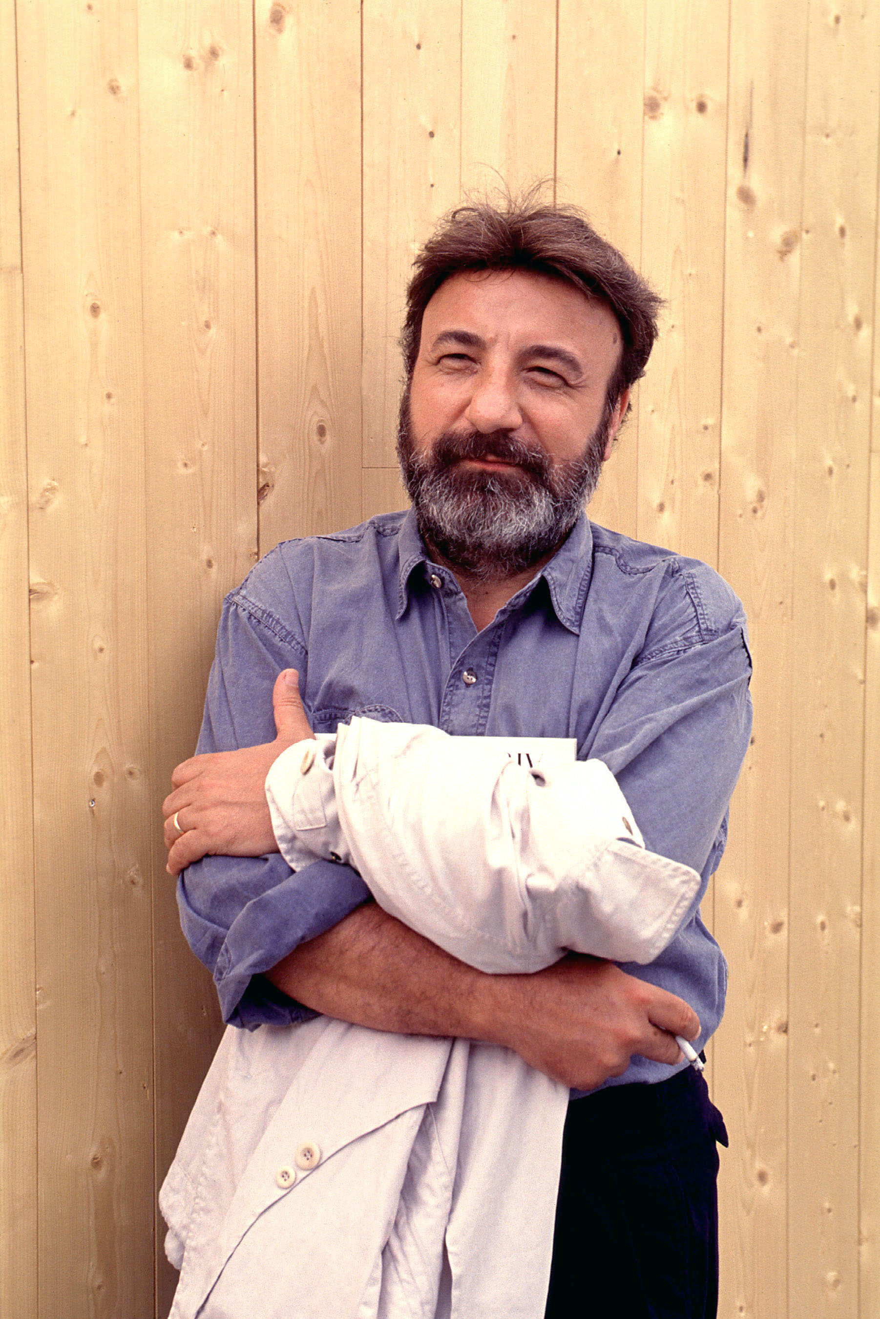 Il regista Gianni Amelio, componente della giuria della Mostra del Cinema di Venezia del 1992